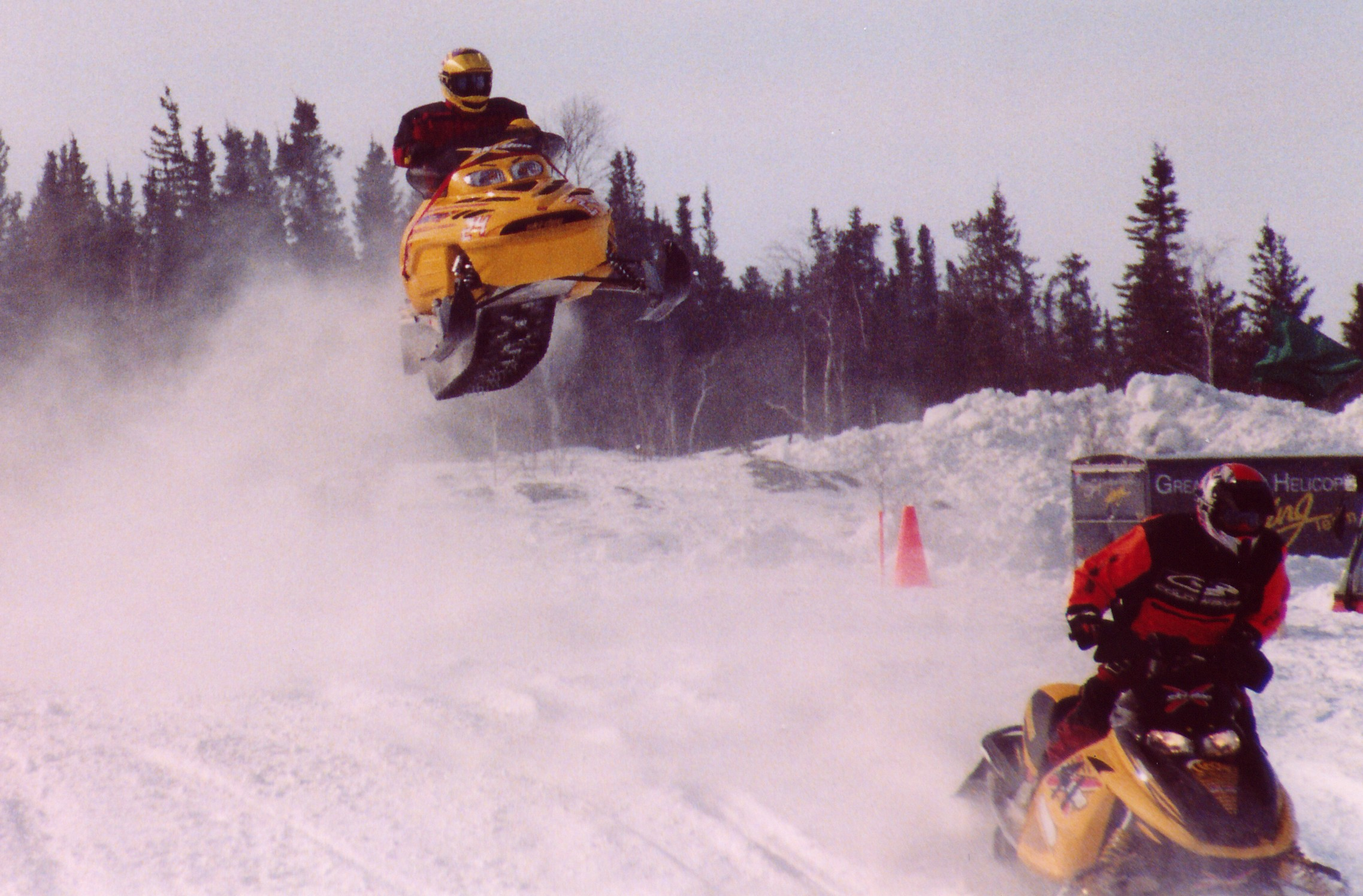 Snowmobile racer doing a jump